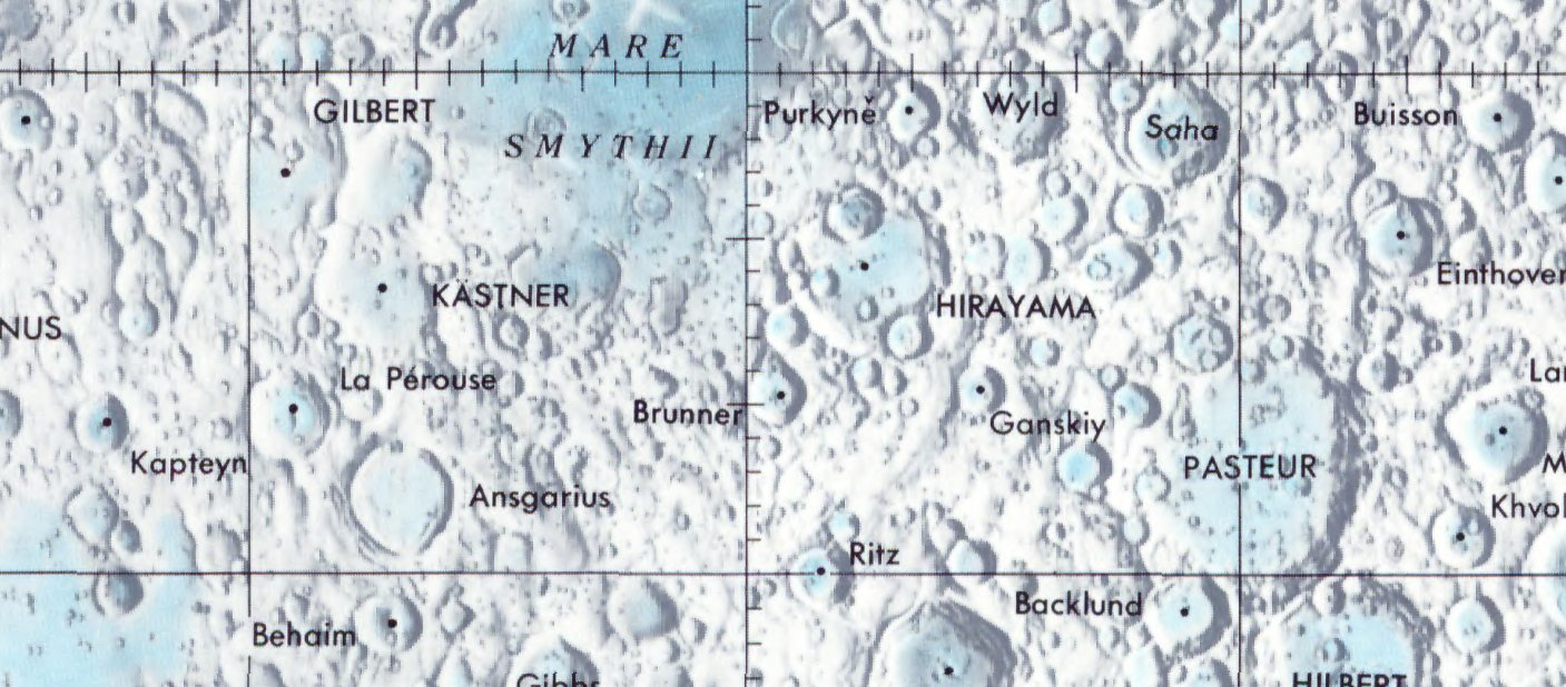 Cráter lunar Brunner. Localización. (Lunar Chart LPC1. Second Edition)